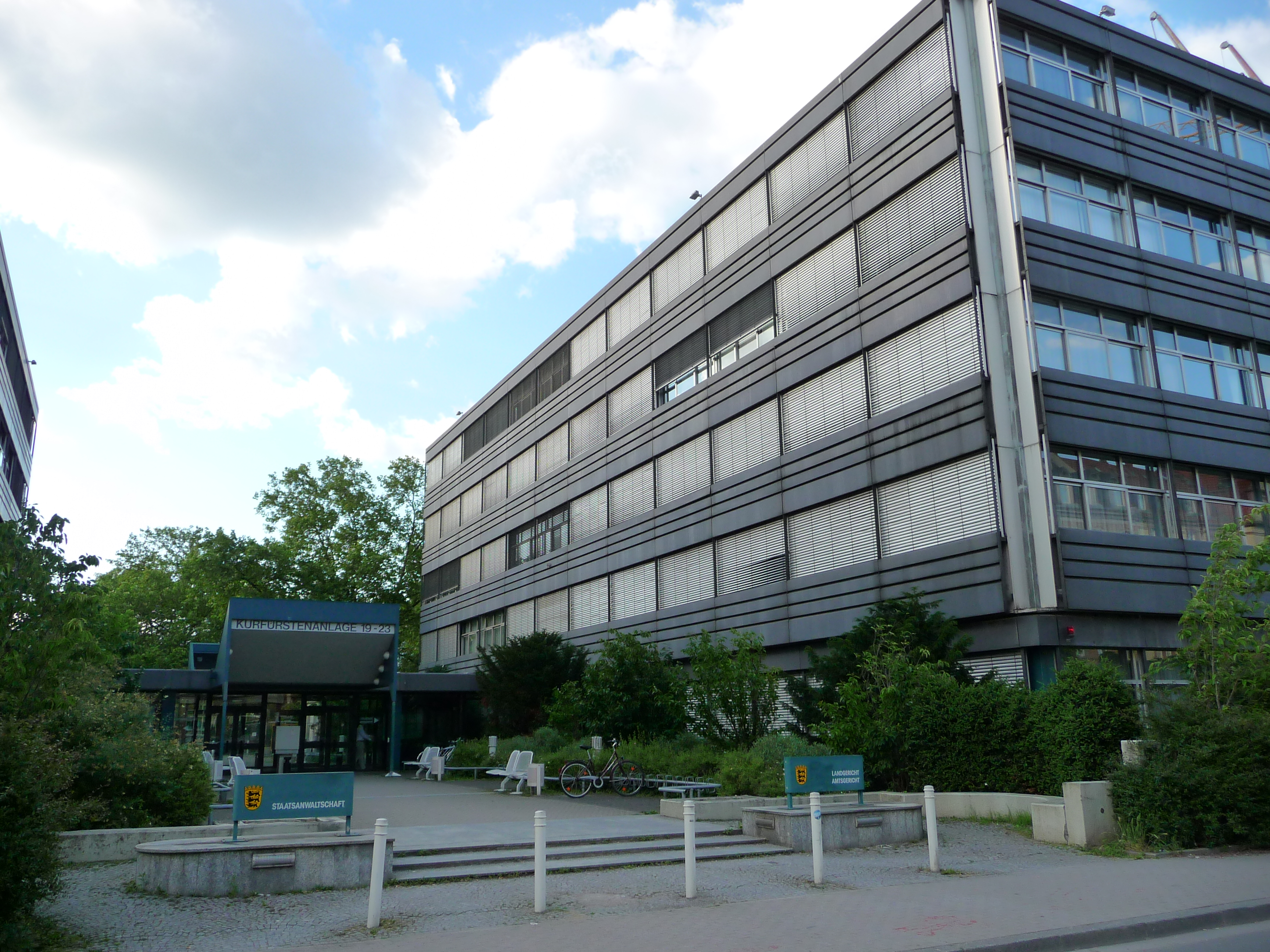 Justizgebäude in Heidelberg, in dem 2009 neben der Staatsanwaltschaft das Amts- und Landgericht untergebracht sind